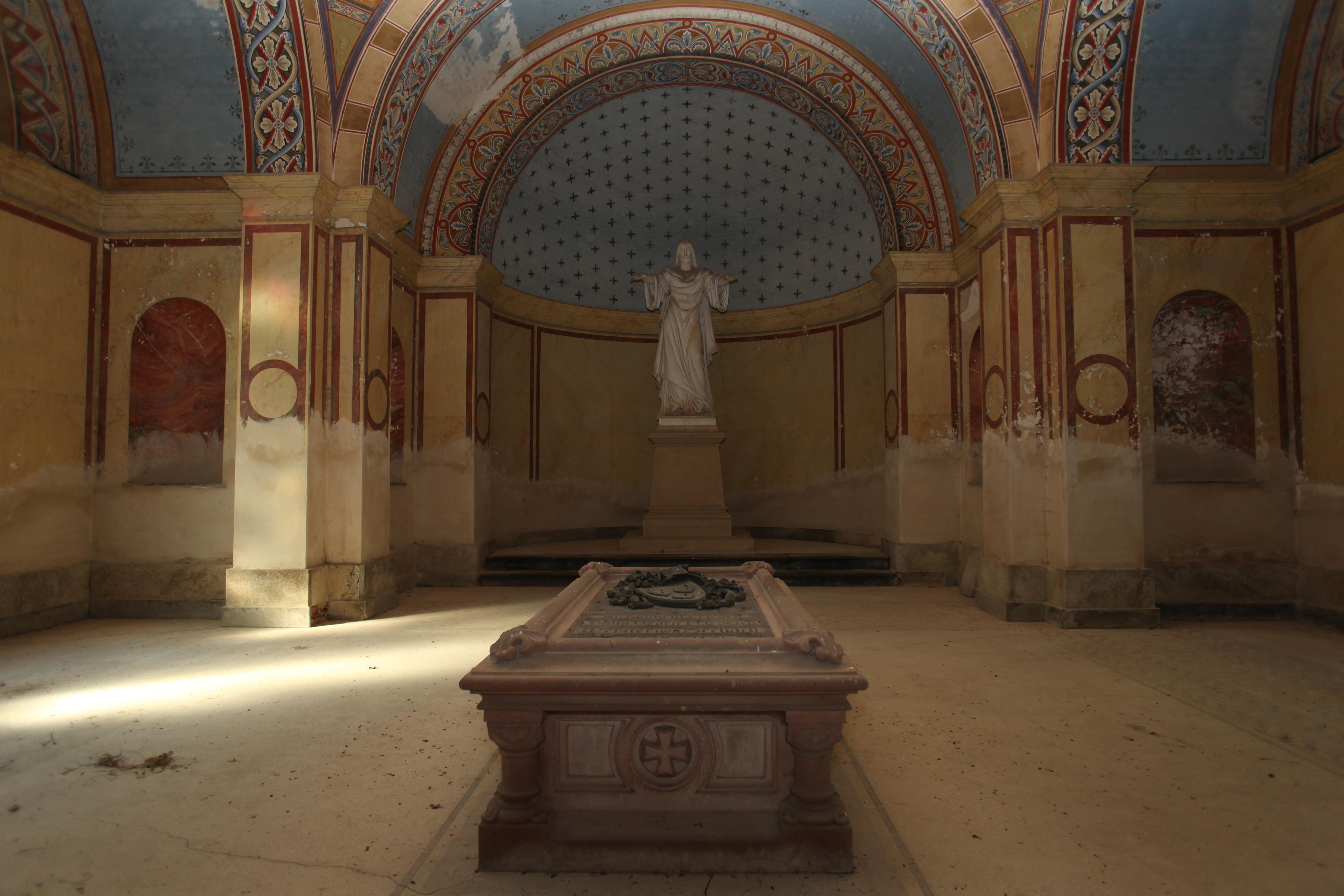 Mausoleum Ziegelsdorf, Marmorstatue von August Sommer